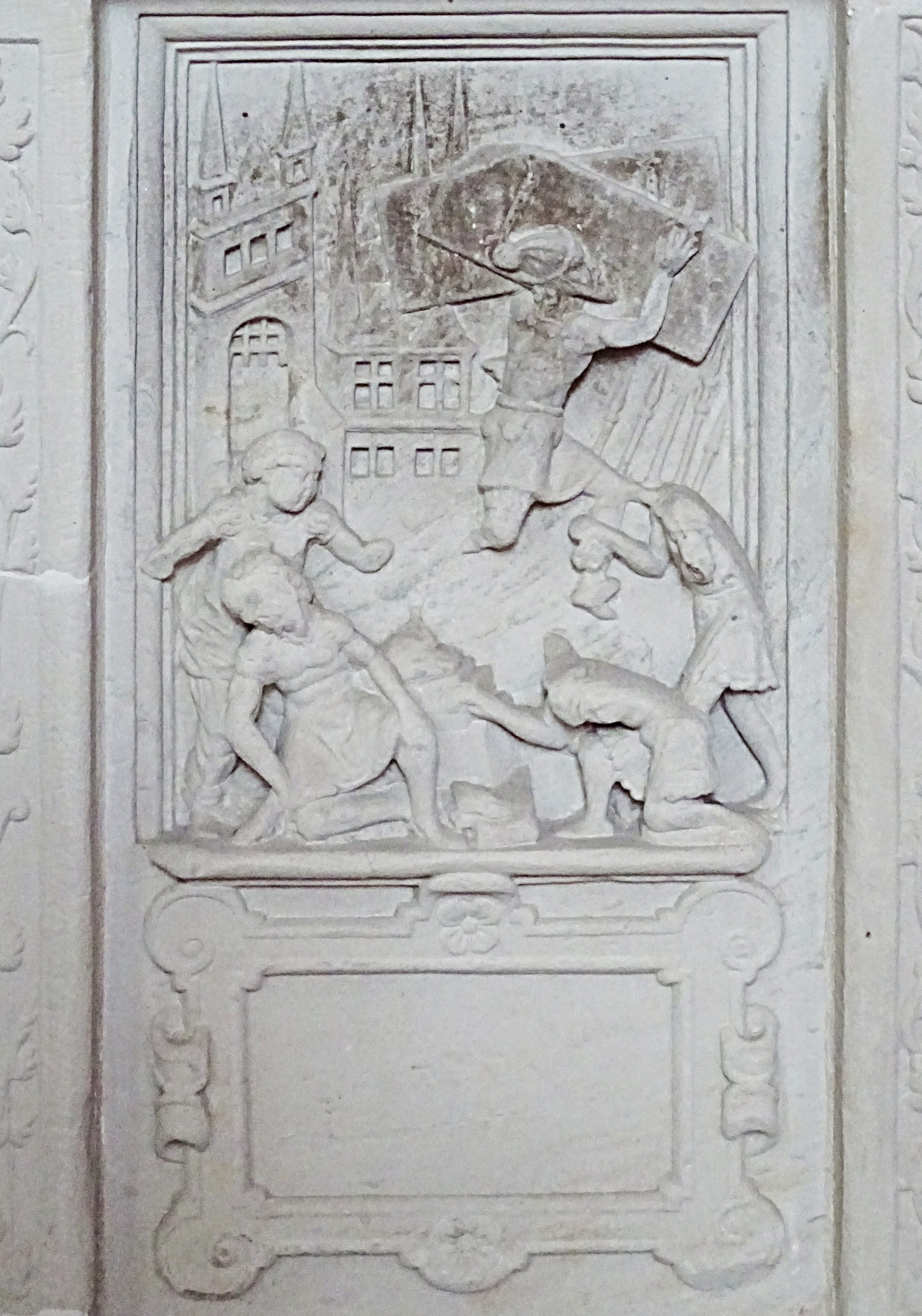 Steinbilderbibel in der St. Annenkirche (Eisleben), 24/29, Simson trägt die Stadttore von Gaza weg